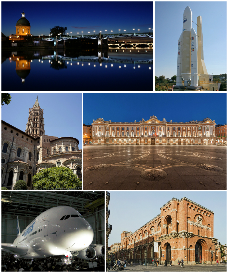 De haut en bas et de gauche à droite: Pont Saint-Pierre de Toulouse, Ariane 5 (Cité de l’Espace), Basilique Saint-Sernin de Toulouse, Place du Capitole de Toulouse, Airbus A380, Musée des Augustins de Toulouse